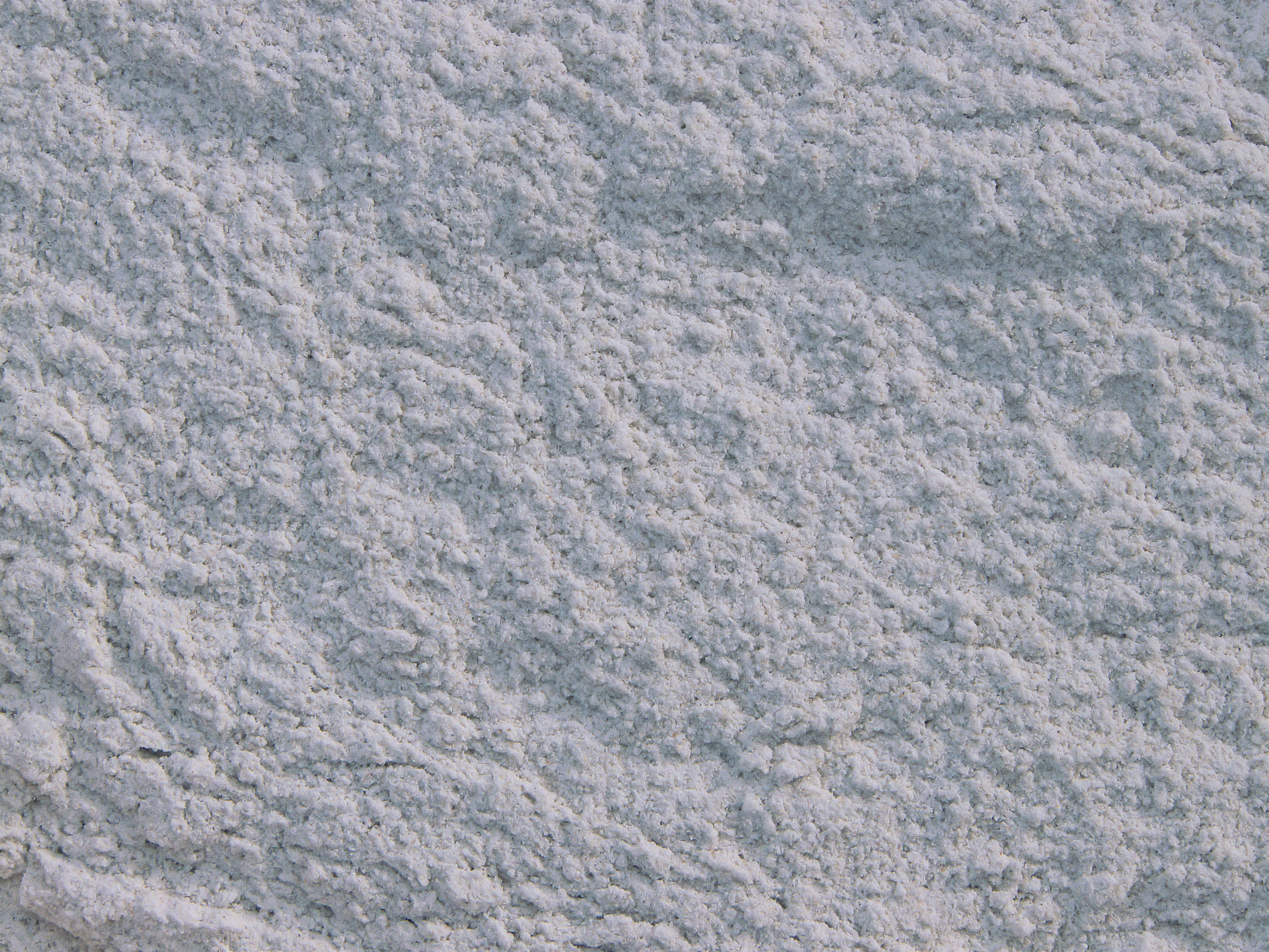 Roggebloem gezeefd door een zeef met 0,25 mm maaswijdte.